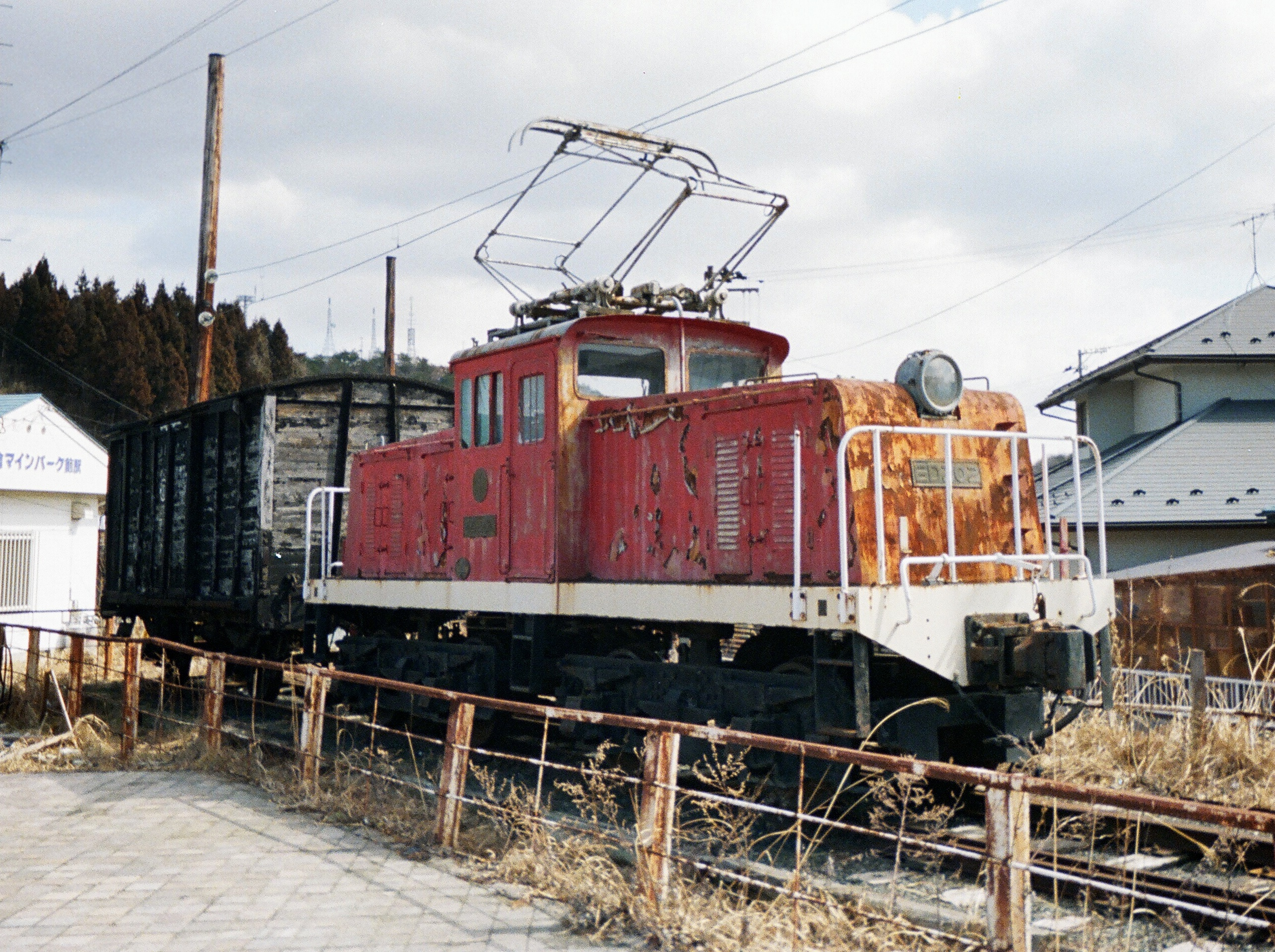 栗原電鉄ED20形電気機関車。（ED203）細倉マインパーク前駅広場にて。